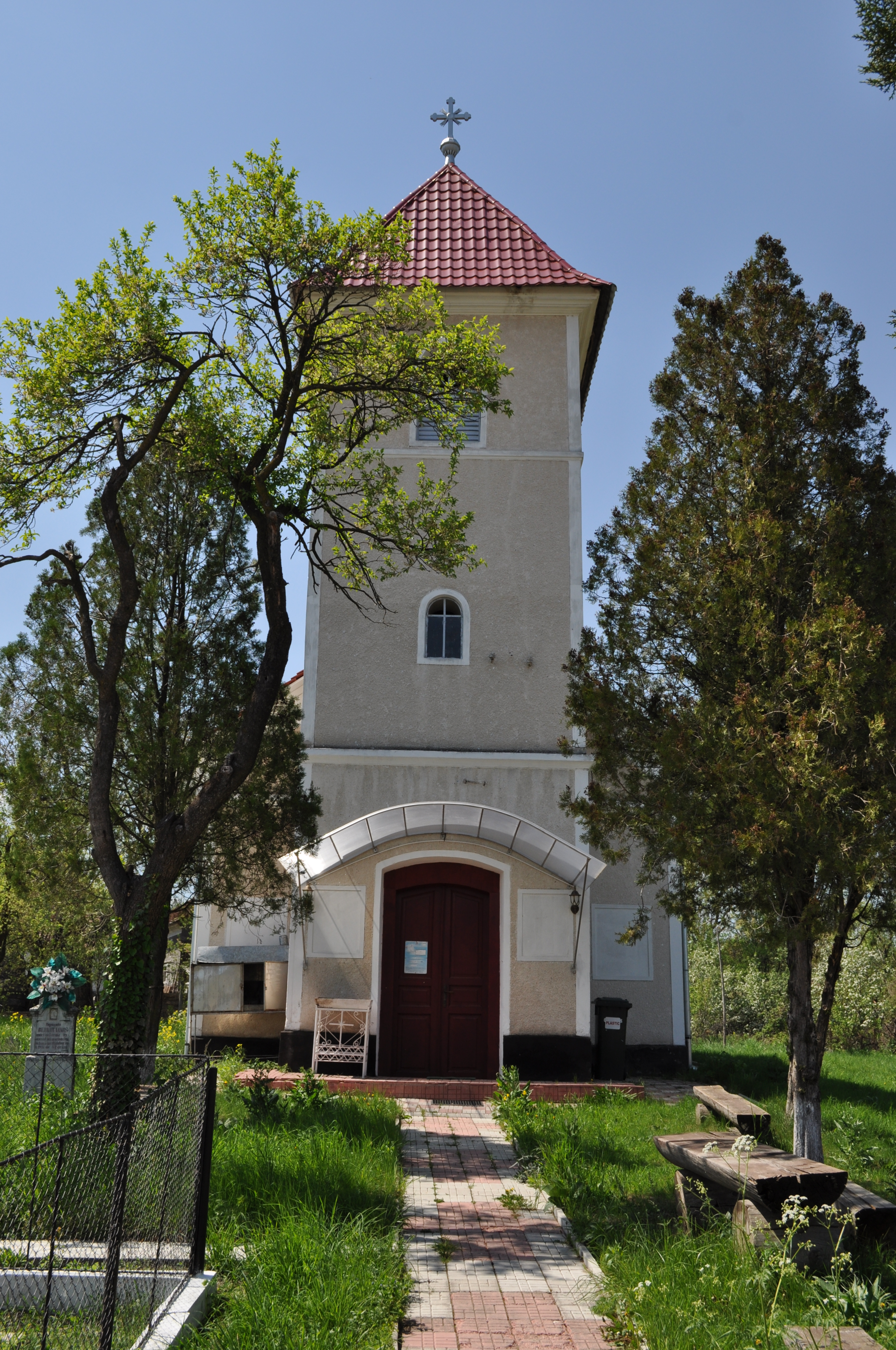 Biserica (fostă reformată) "Cuvioasa Paraschiva" , sat CLOPOTIVA; comuna RÂU DE MORI